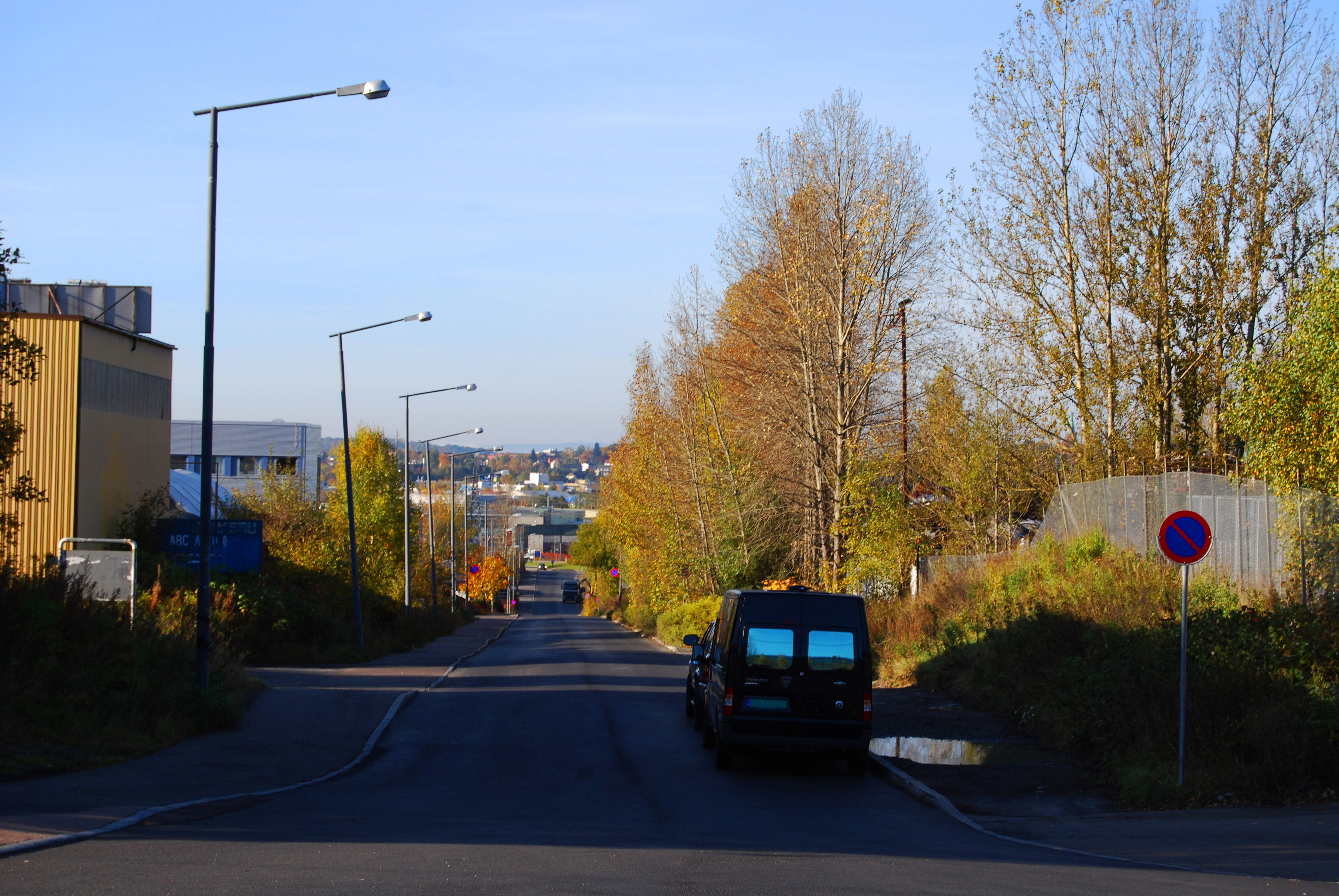 Verkseier Furulunds vei på Alnabru i Oslo.